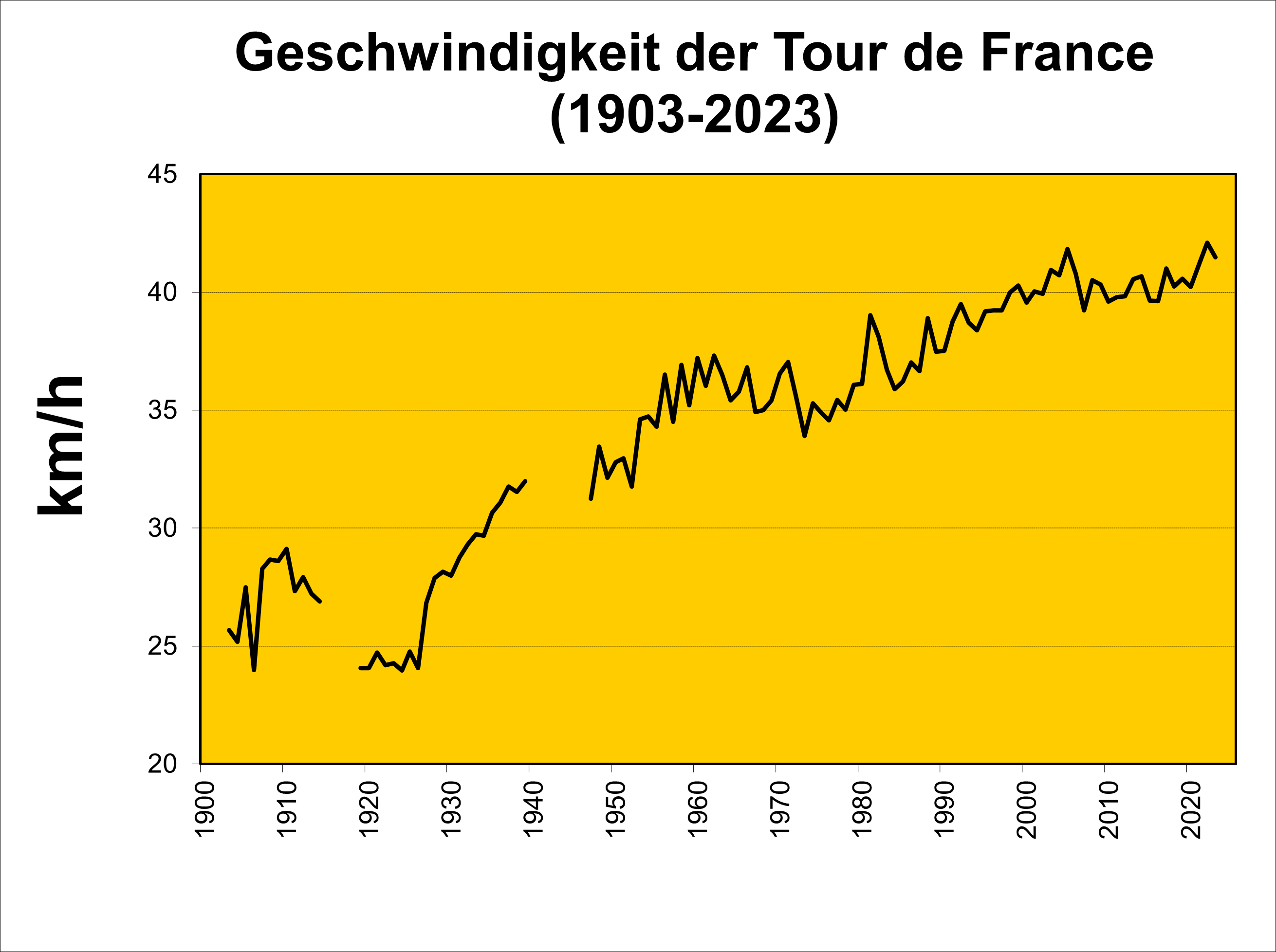 Durchschnittsgeschwindigkeiten der Sieger der Tour de France von 1903 - 2013